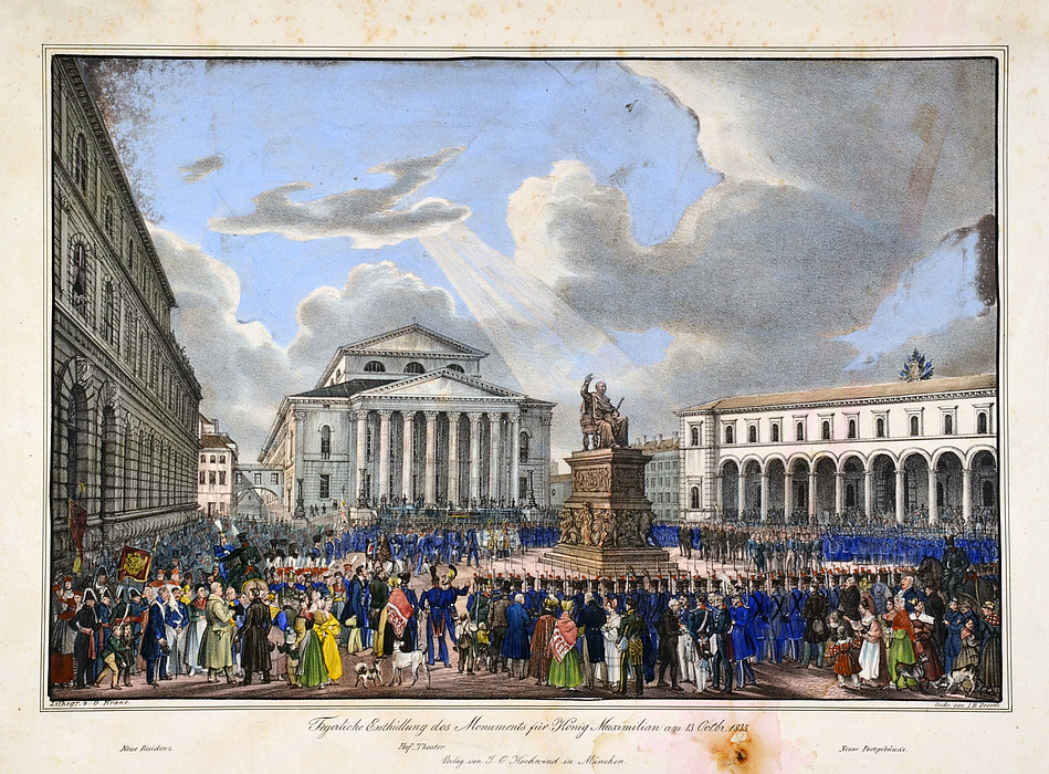 "Feyerliche Enthüllung des Monuments für König Maximilian am 13. Octbr. 1835". Altkolorierte Lithographie von G. Kraus bei Hochwind in München. 24 x 35 cm